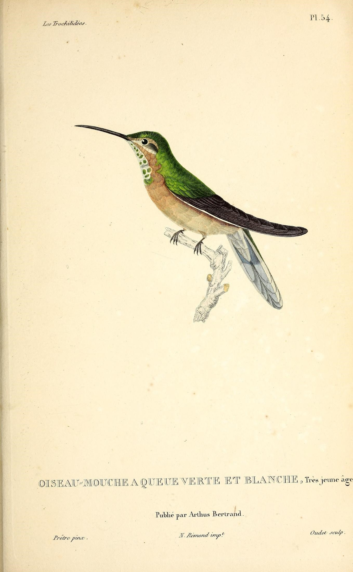 Les trochilidées :. Paris :A. Bertrand,[1832?].